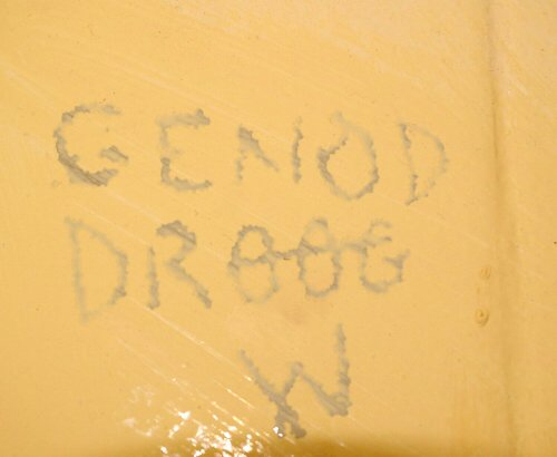 Graffito Cymraeg ieithyddol - nodwedd o’r Cymry?